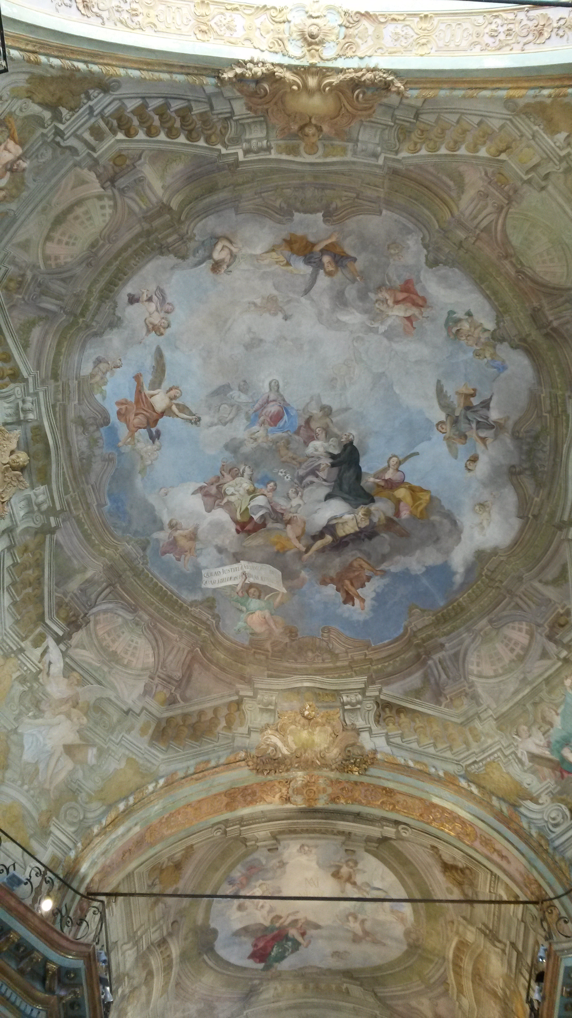 Gloria di San Giuseppe Calasanzio (1750), di Giuseppe Galeotti, Chiesa del SS. Nome di Maria e degli Angeli Custodi, costruita dai Padri Scolopi nel primo decennio del XVIII, esaltando la figura di San Giuseppe Calasanzio, fondatore dell’Ordine, raffigurato nella volta della navata